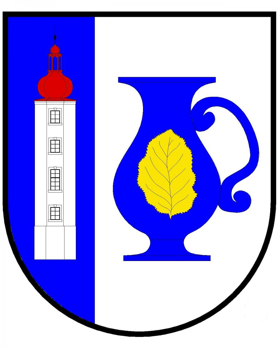 znak obce Bukovany